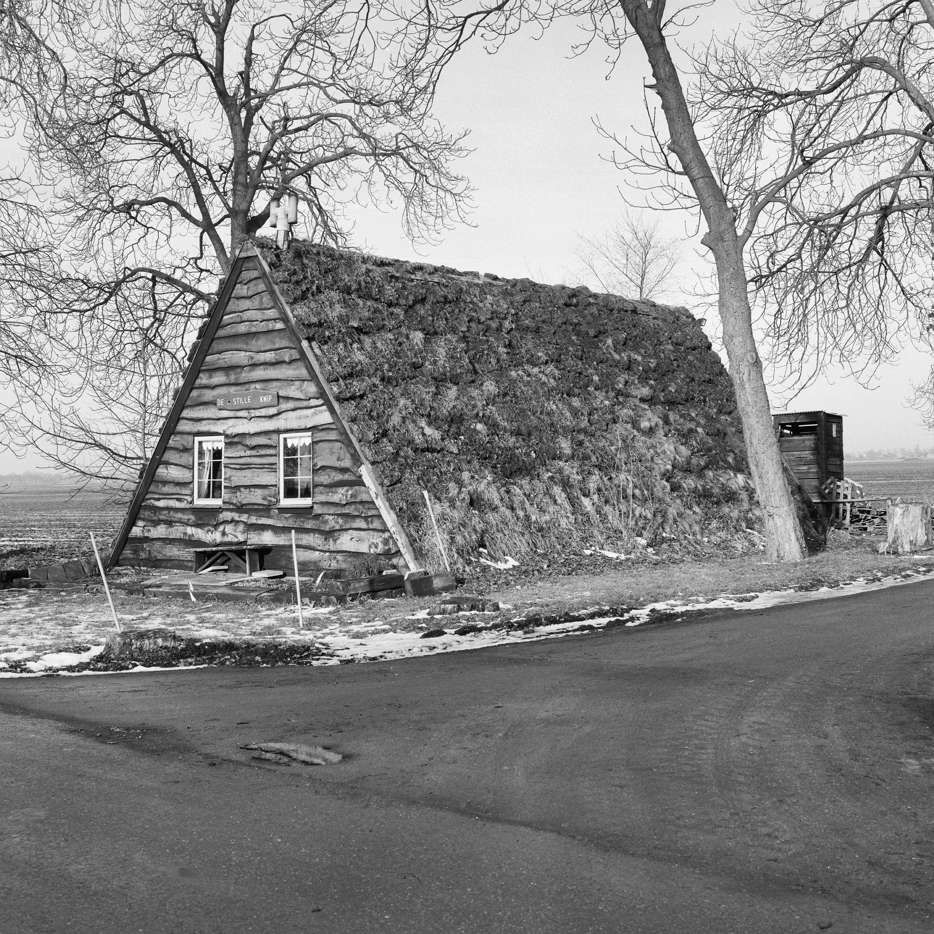 Exterieur OVERZICHT PLAGGENHUT BIJ HET KANAAL